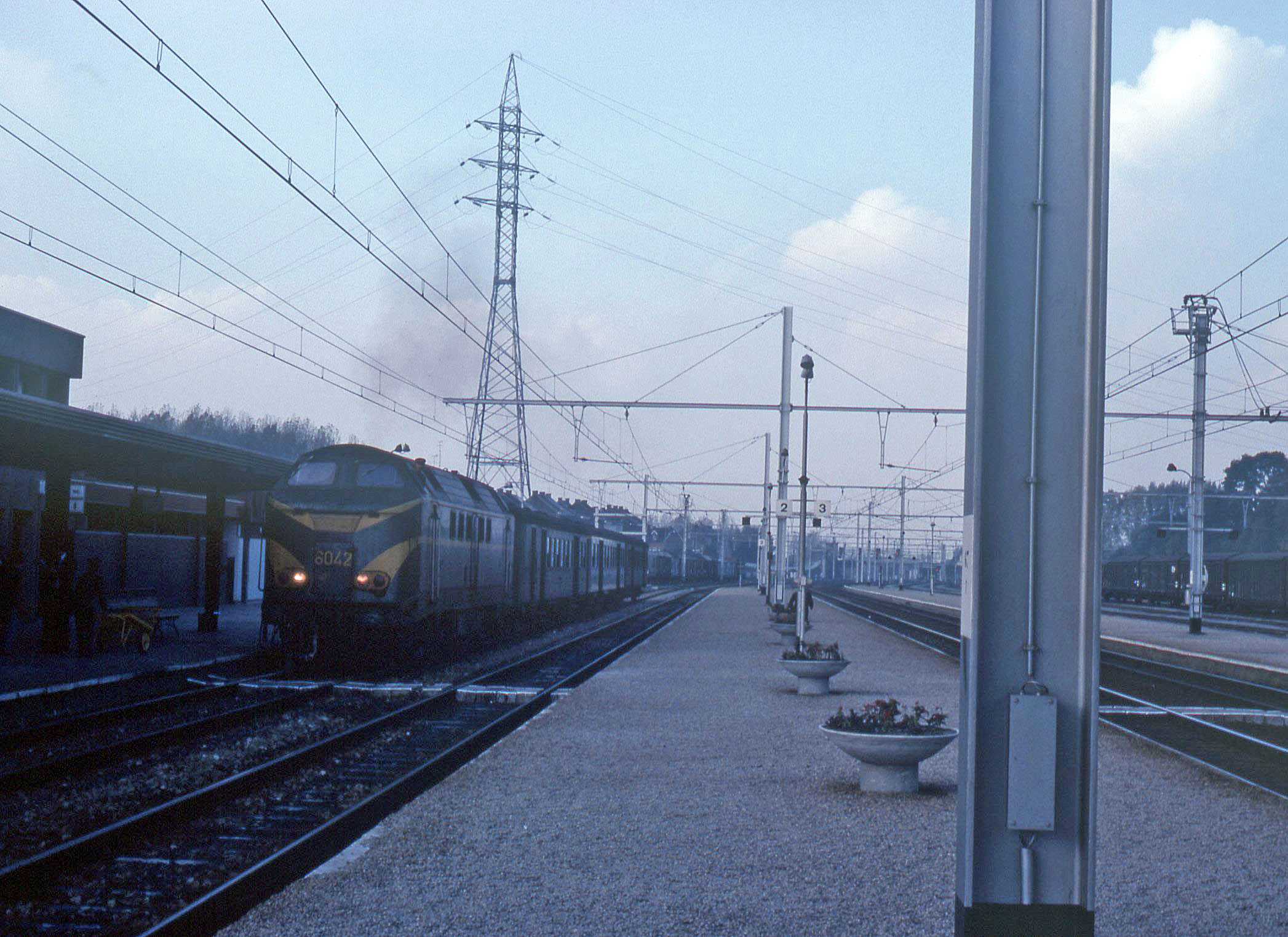 Het station Manage met een getrokken trein